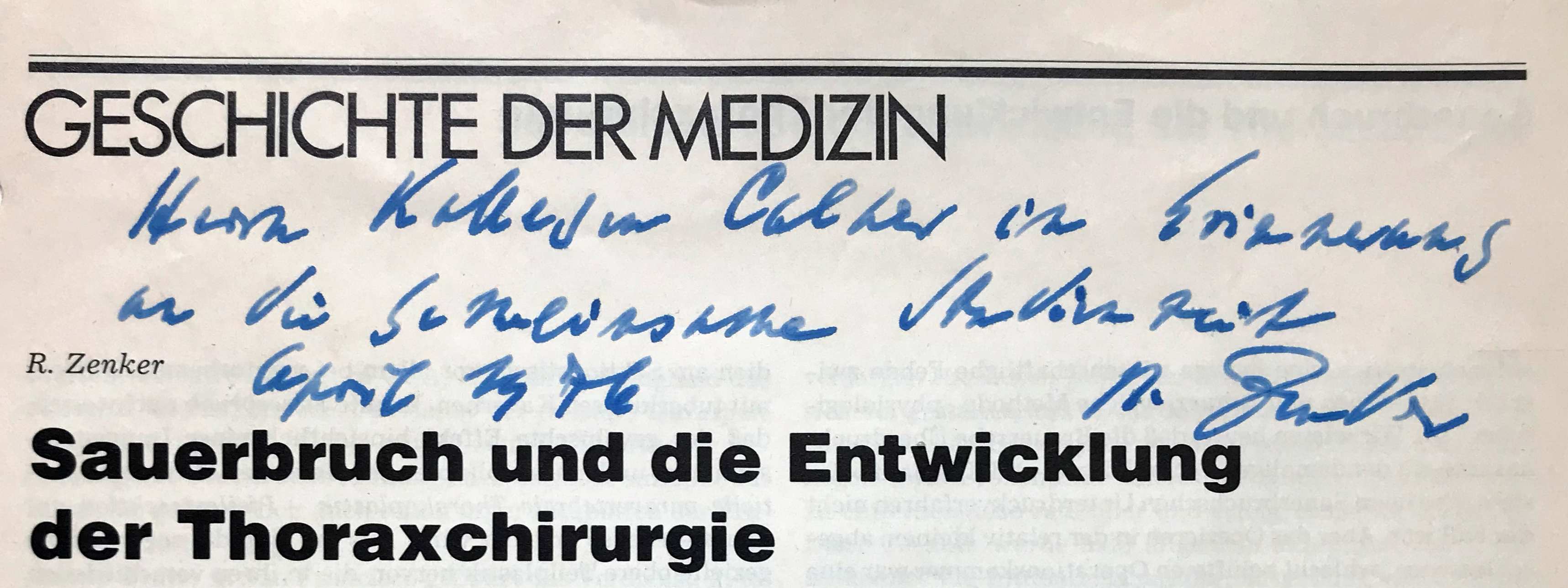 Handschriftlicher Kommentar von Rudolf Zenker zu einem selbst verfaßten Artikel. Abfotografiert vom Original.